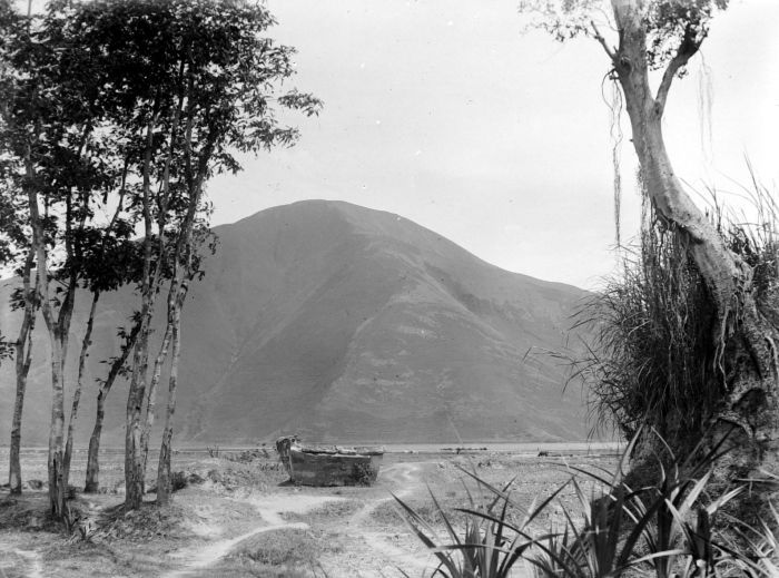 Negatief. Een sarcofaag op Samosir, Res. Tapanoeli